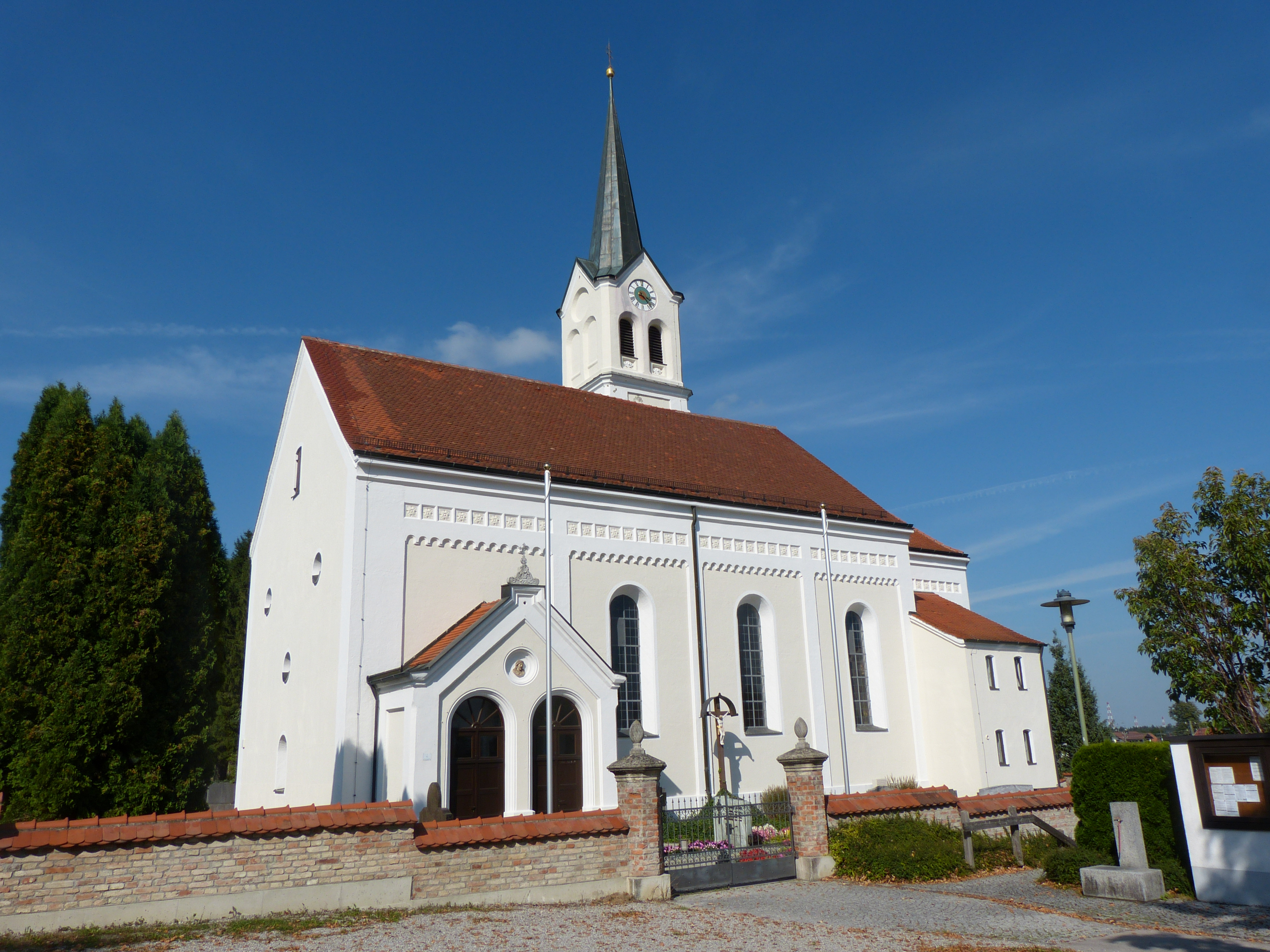 Mariä Heimsuchung in Amberg, Landkreis Unterallgäu, BayernThis is a photograph of an architectural monument.